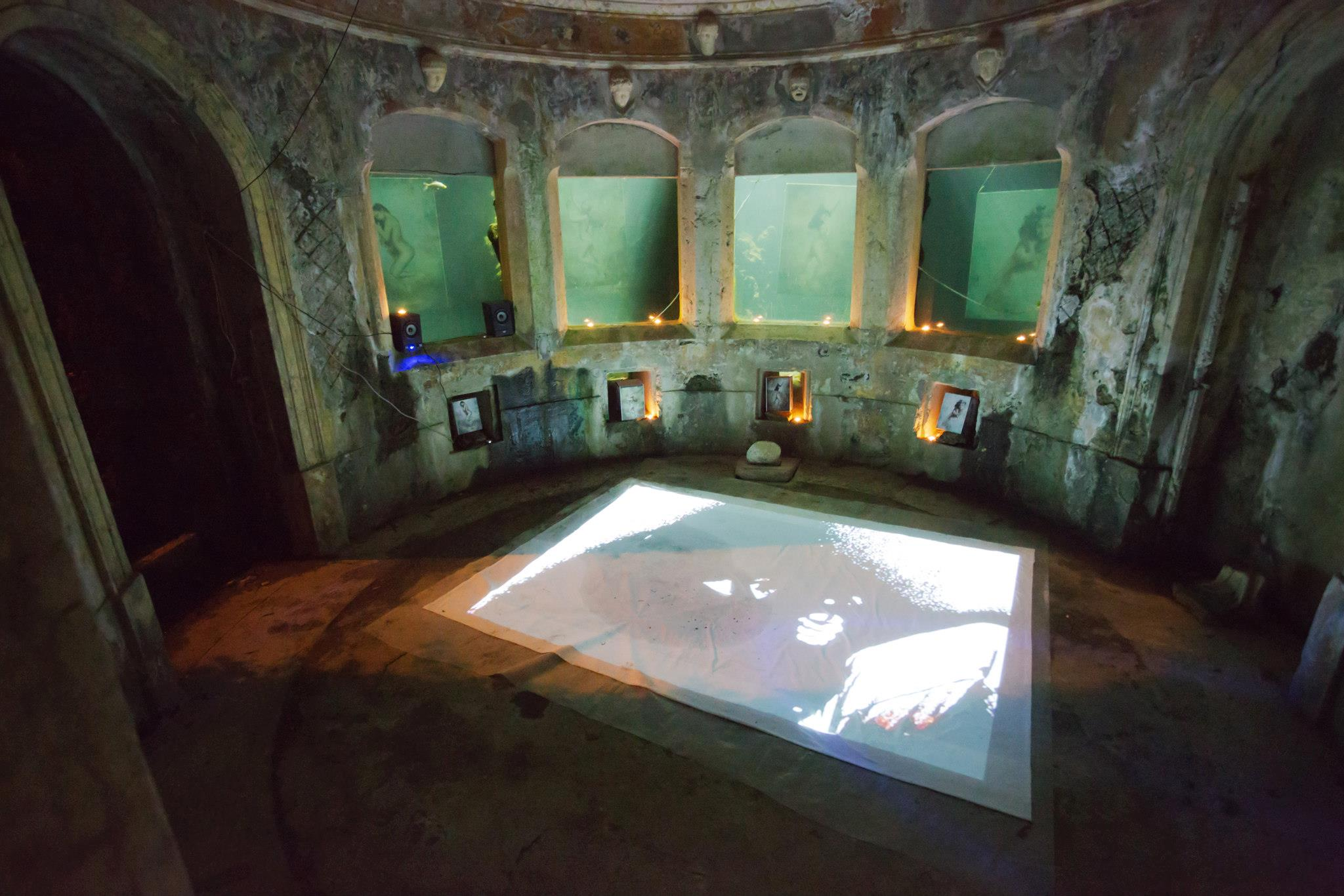 Opera di Ivana Galli, titolo: "Le quattro stagioni". Opera installata all'interno dell'acquario del Parco Storico di Villa Rossi in occasione del Festival Alto Vicentino 2014